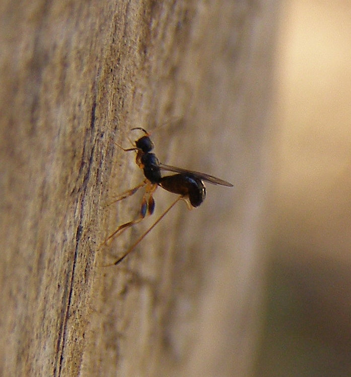 Rhoptrocentrus piceus, femelle pondant dans un billot de pin d'Alep